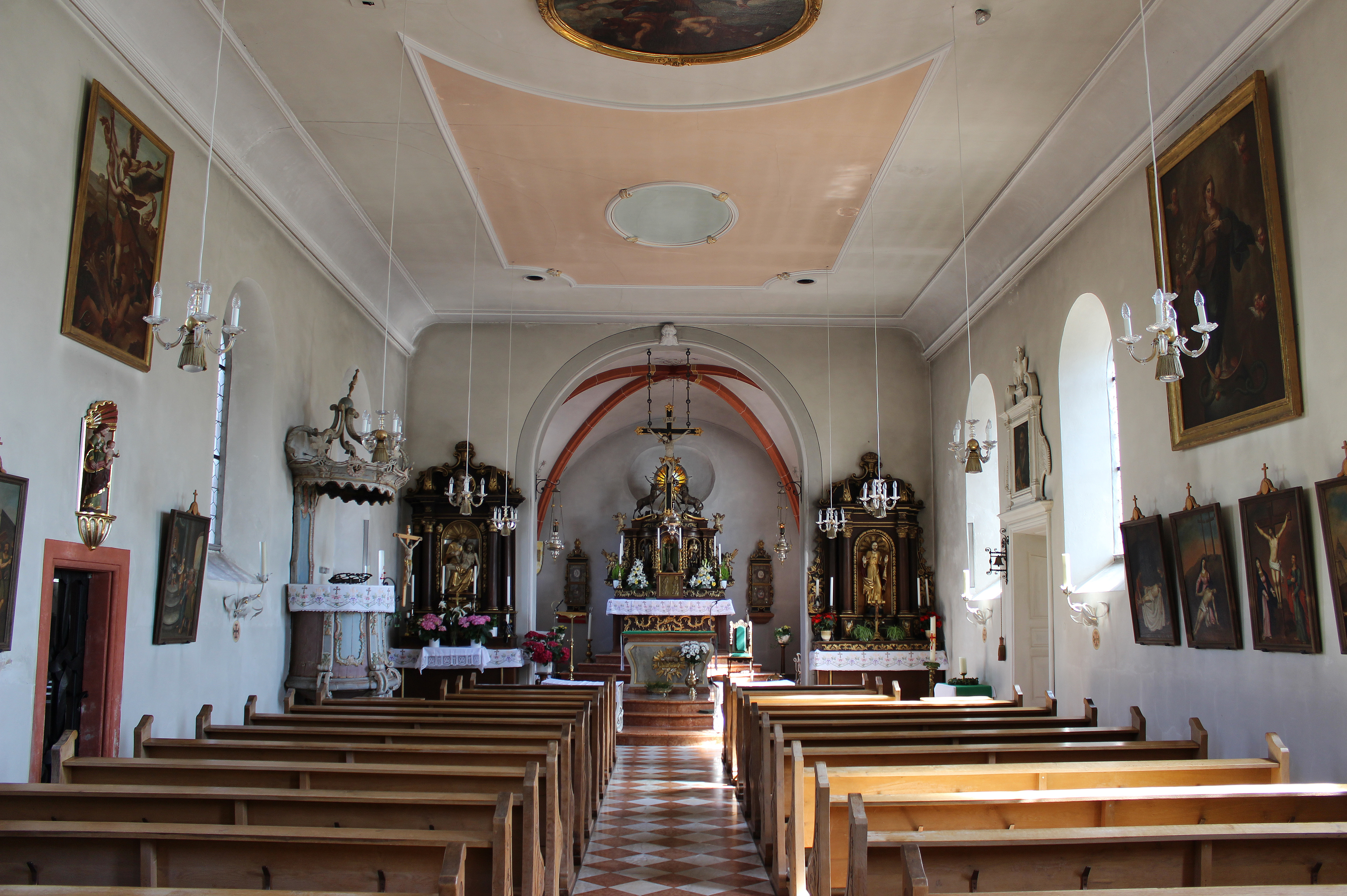 Blick ins Innere der katholischen Pfarrkirche St. Hubertus in Ihn, einem Ortsteil der Gemeinde Wallerfangen, Landkreis Saarlouis, Saarland